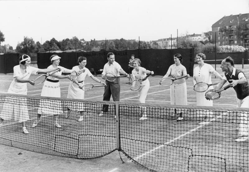 KdF.-Sport